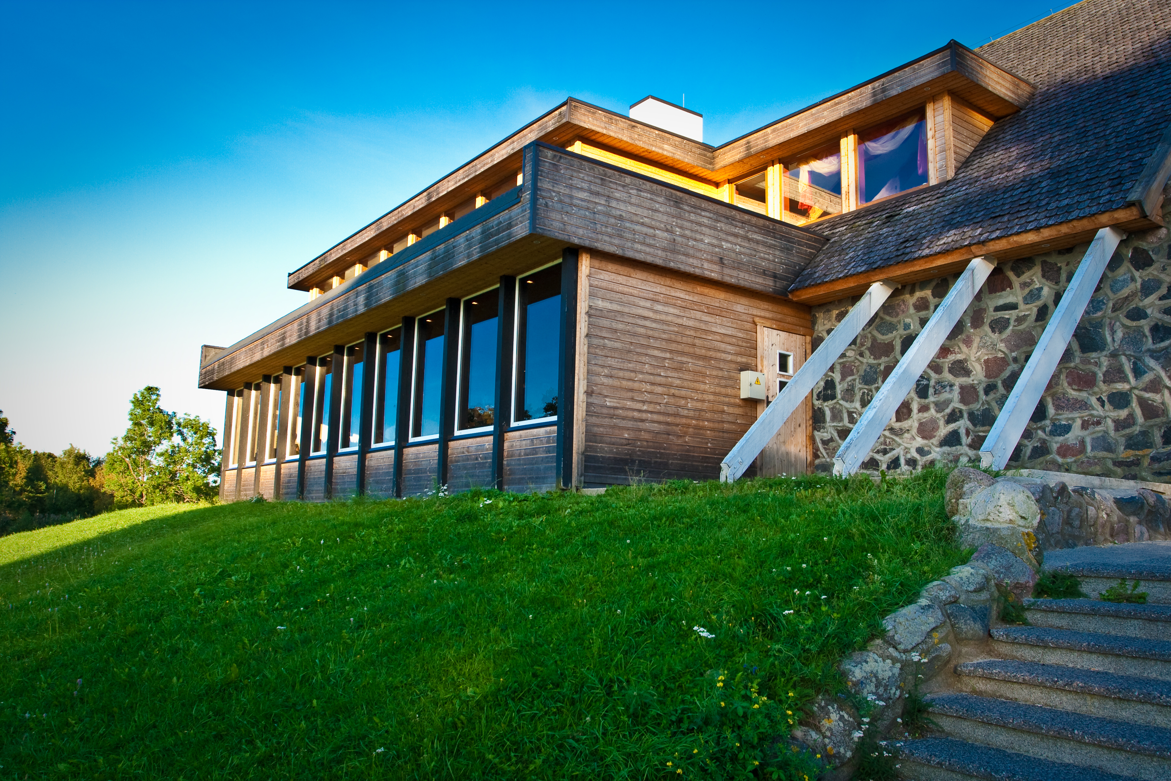 Rannapaargu restaurant in Kärdla, Hiiumaa, Estonia.